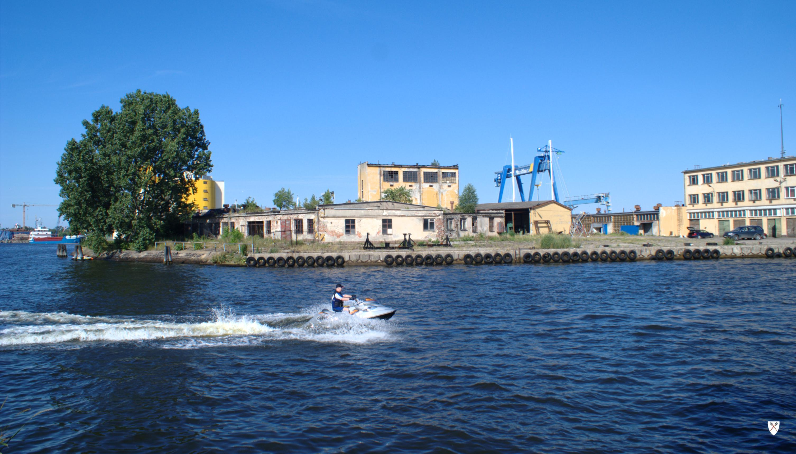 Gdańsk. Polski Hak i Motława.